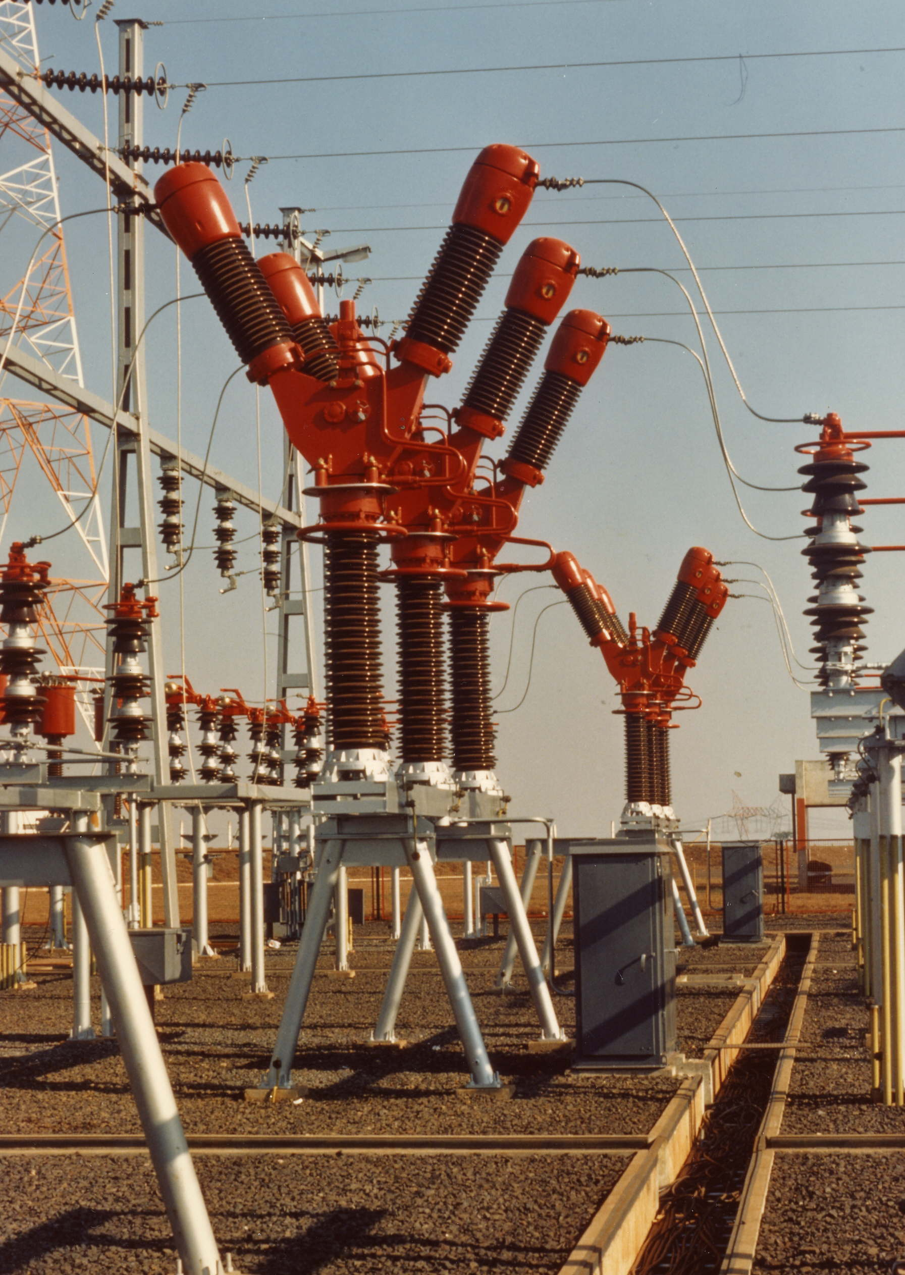 Oil circuit breaker (disjoncteur à huile) (Маломасляный выключатель)